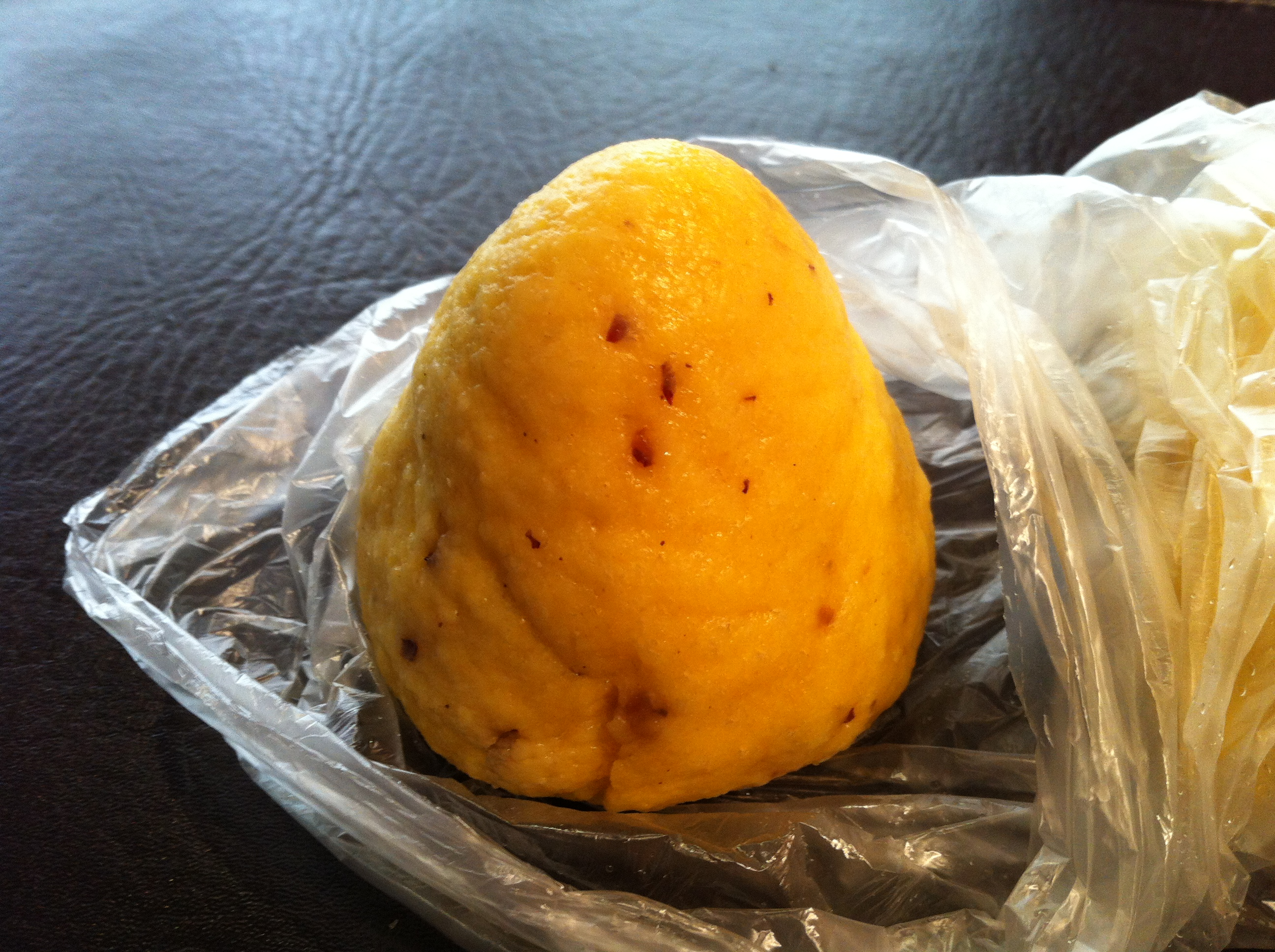 窝窝头